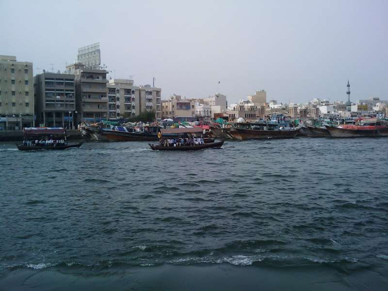 صورة من خور دبي